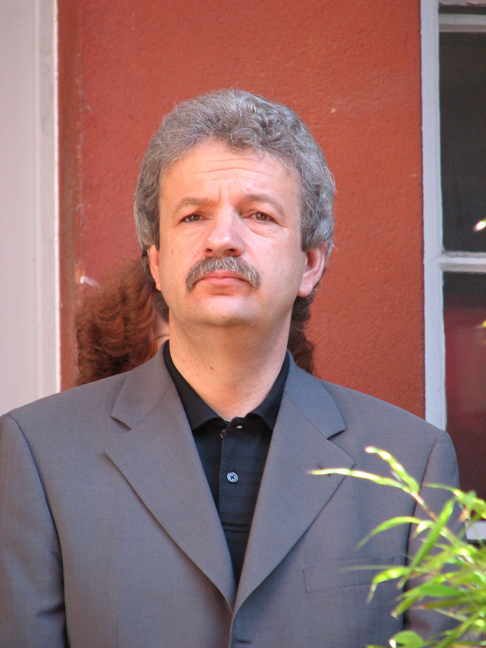 Bad Kissingens Oberbürgermeister Karl Heinz Laudenbach